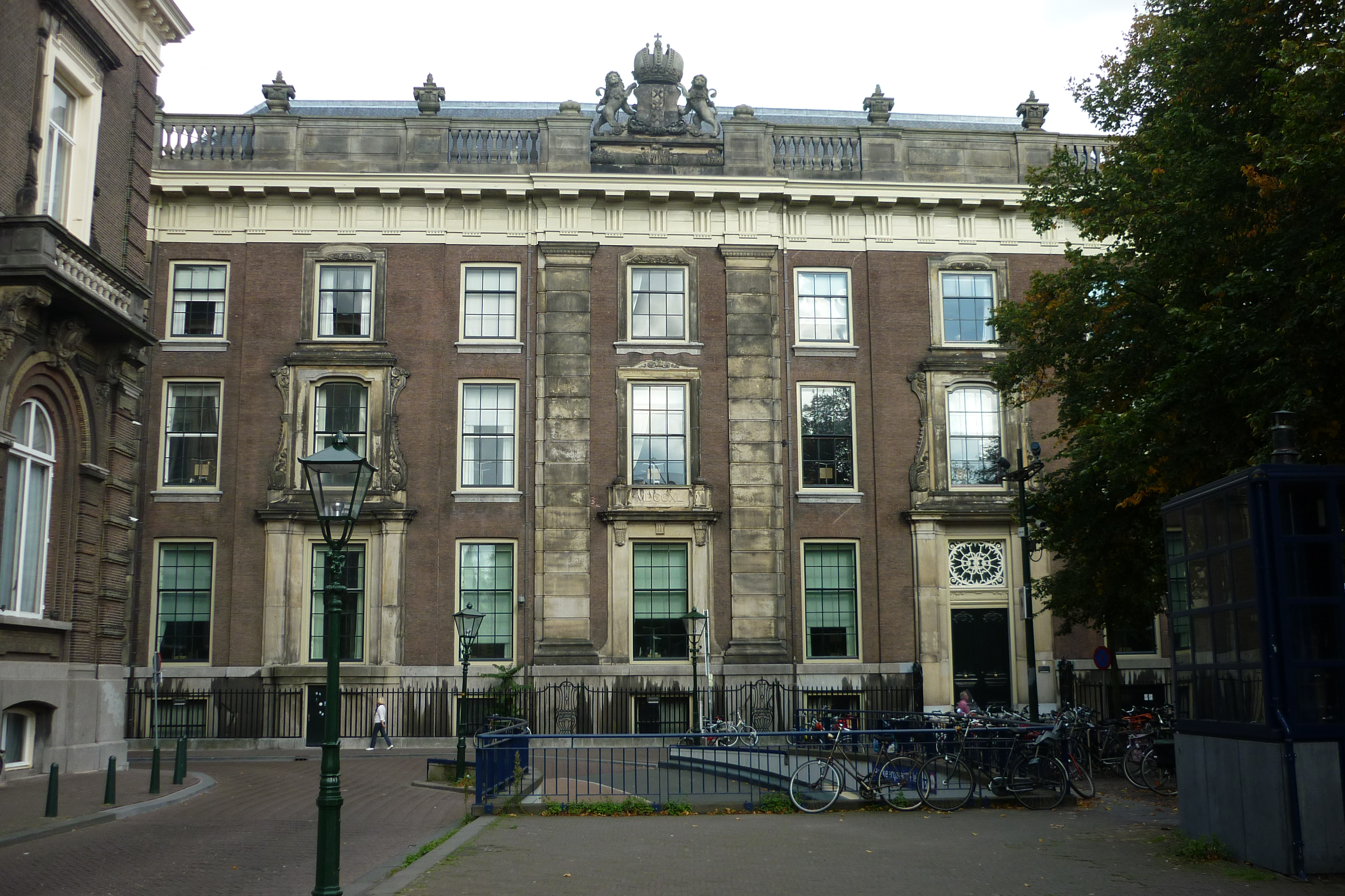 Logement van Amsterdam op het Plein in Den Haag